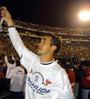 Mvidrio